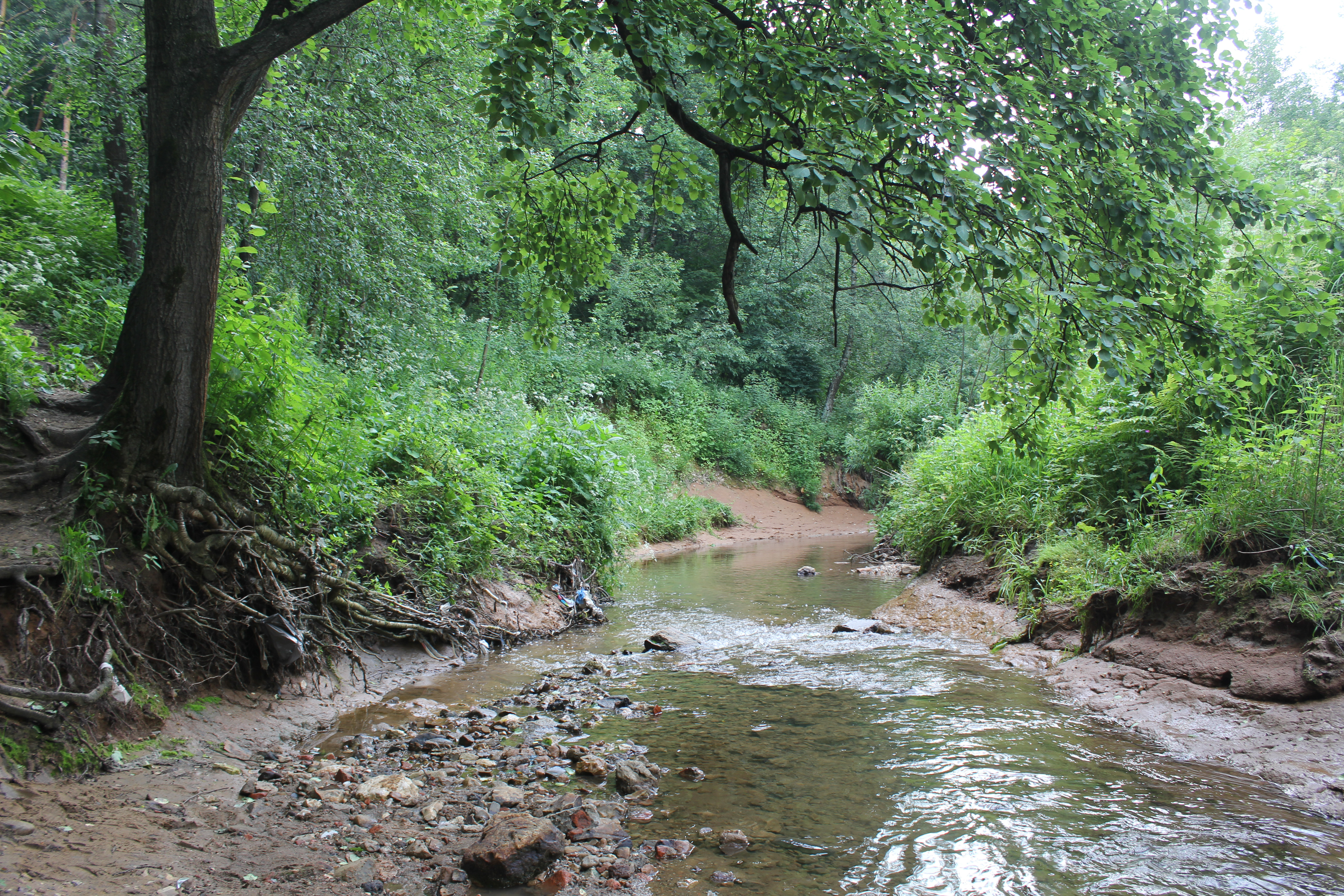 Долина реки Самородинки